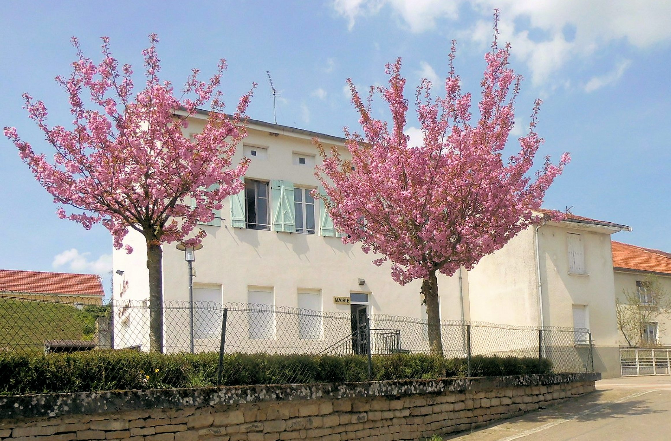 La mairie de Dommartin-sur-Vraine